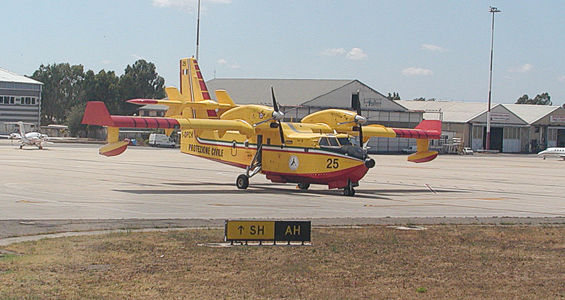 Feuerlöschflugzeug in Rom-Ciampino